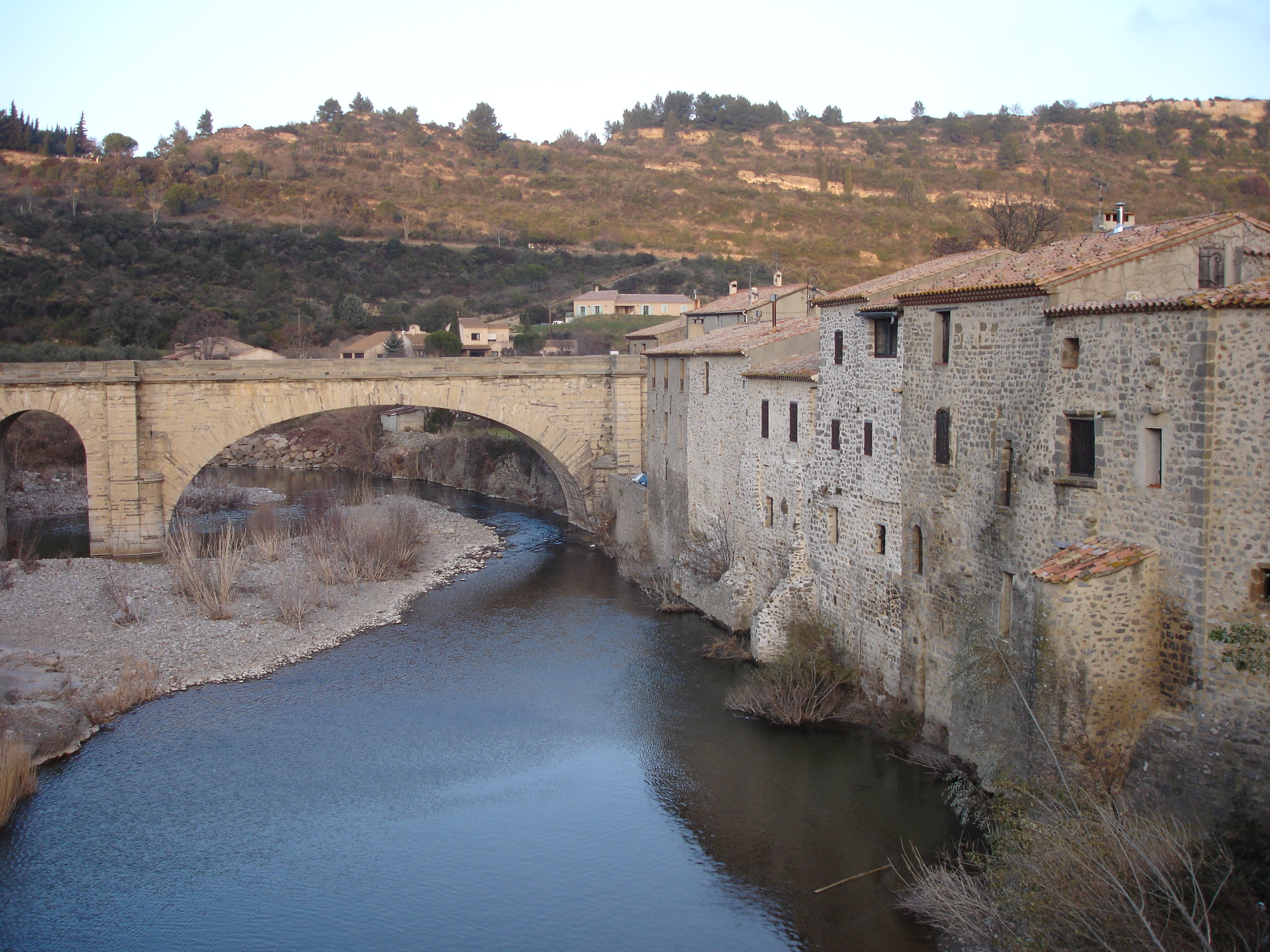 France - Lagrasse (11) - Village